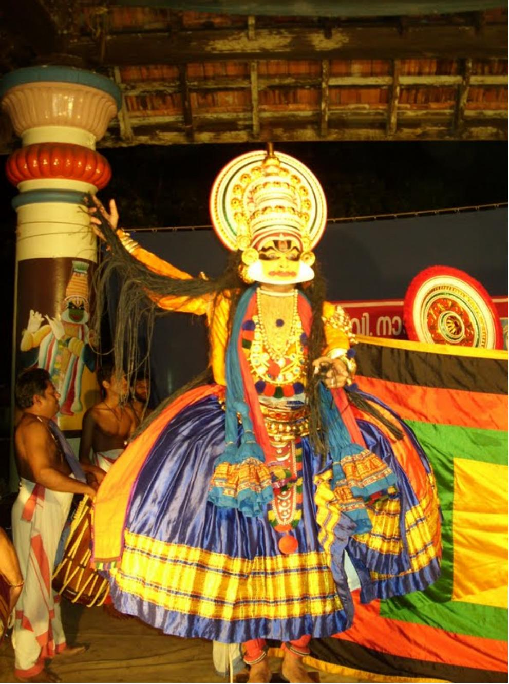 നാല്പത്തെണ്ണീശ്വരം-കഥകളി-ദക്ഷയാഗം-ആനക്കൊട്ടിലിൽ അരങ്ങേറുന്നു